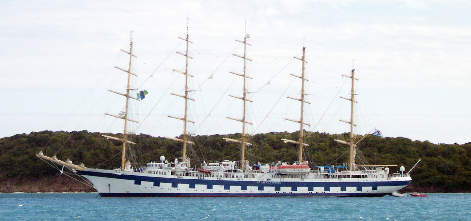 De Royal Clipper